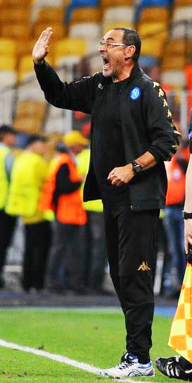 Maurizio Sarri as a coach of Napoli in 2016